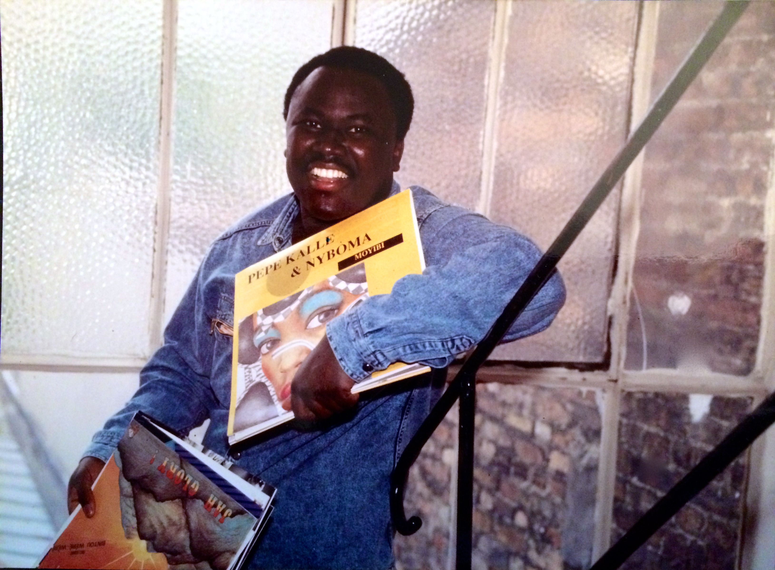 Ibrahima Sylla en 1989